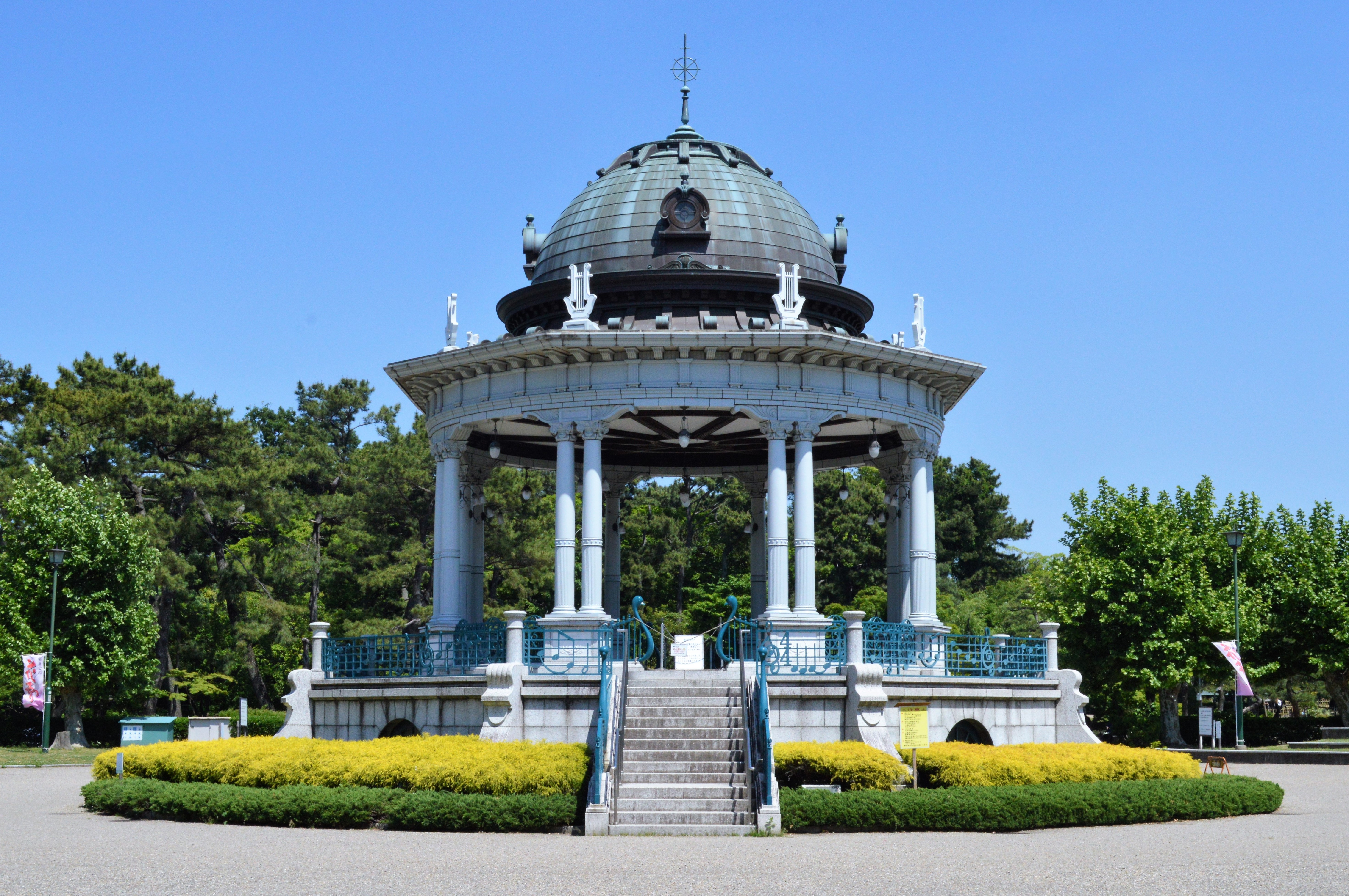 名古屋市の鶴舞公園にある奏楽堂。